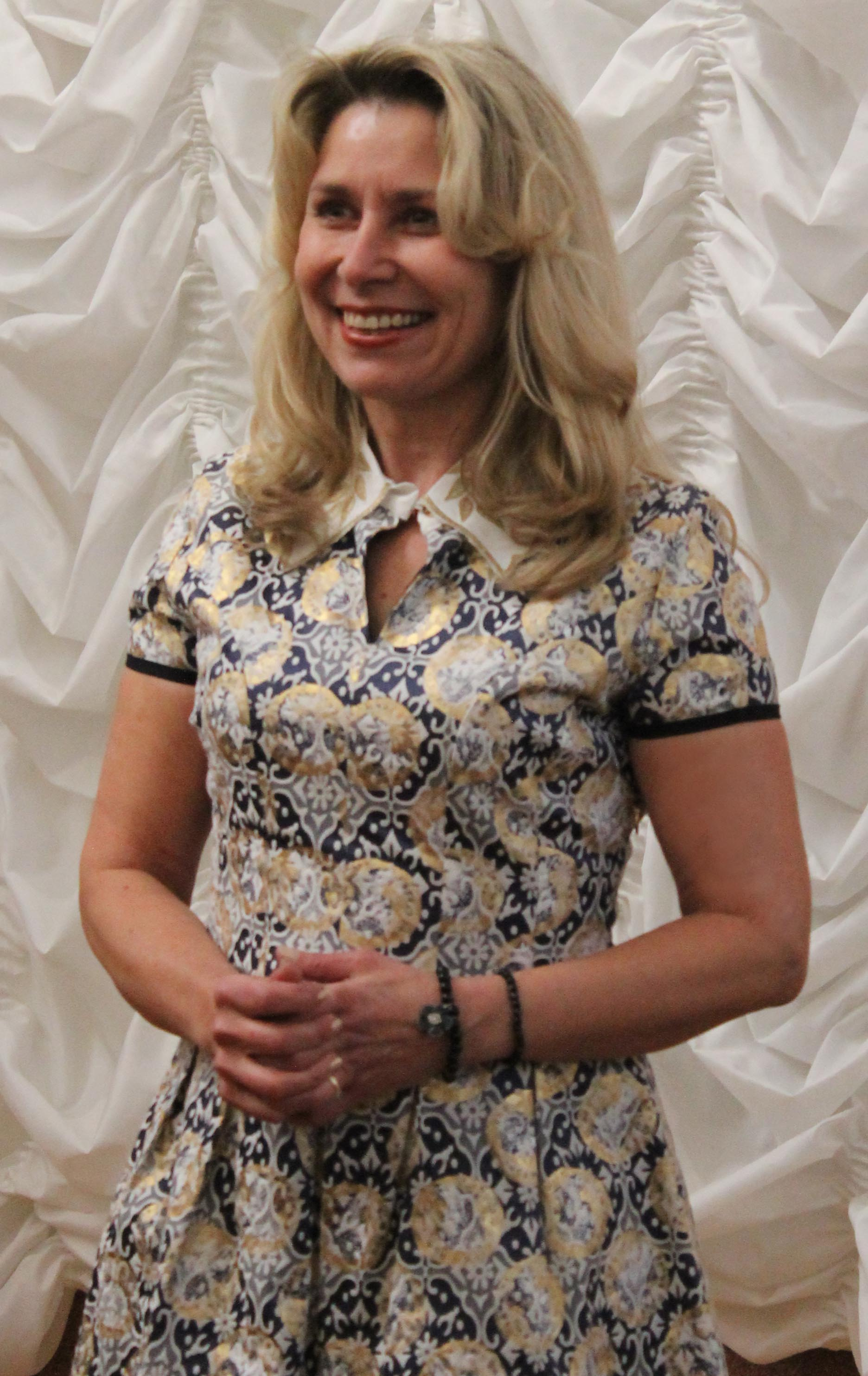 Аксана Аракчэева, 24 сакавіка 2015, уручэнне дыплома камісіі Рэспублікі Беларусь па справах ЮНЕСКА